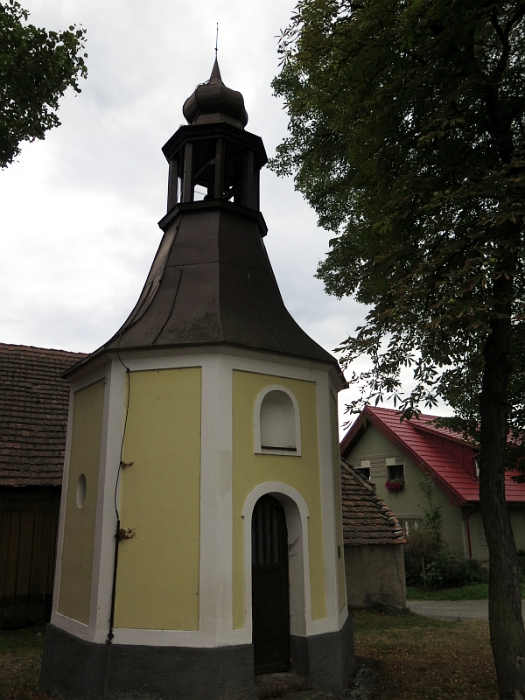 Kaple, náves, Bolešiny.